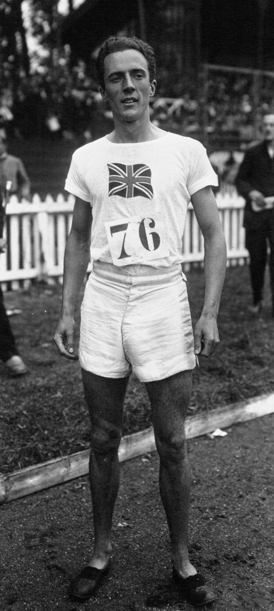 Colombes : match d'athlétisme France - Angleterre : Mountain gagnant le 800 m : [photographie de presse] / Agence Meurisse